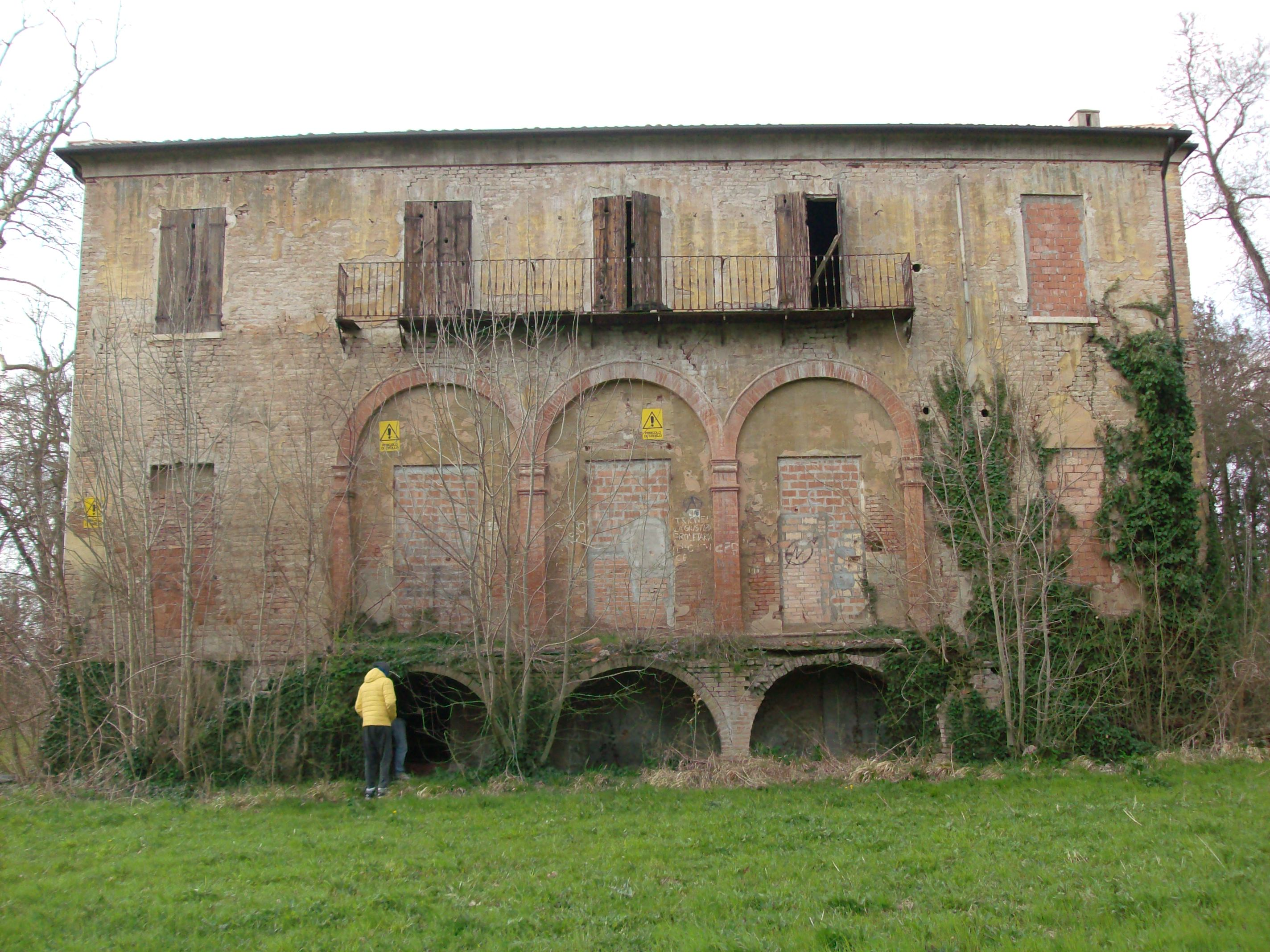 Villa Magnoni a Cona (Ferrara)